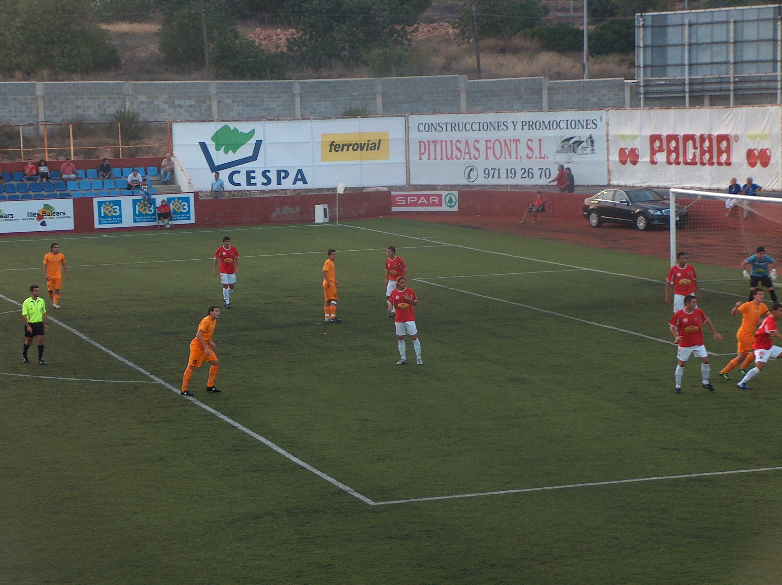 Partit de Copa del Rei disputat el 29 d'agost de 2007 a l'Estadi Can Misses (Eivissa) entre l'Eivissa i el Alacant CF amb resultat 0-2.